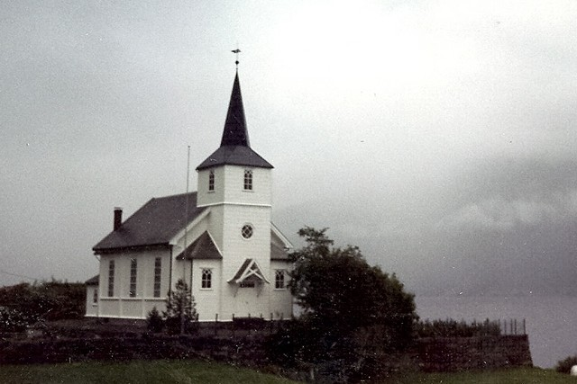 Heggjabygda kirke